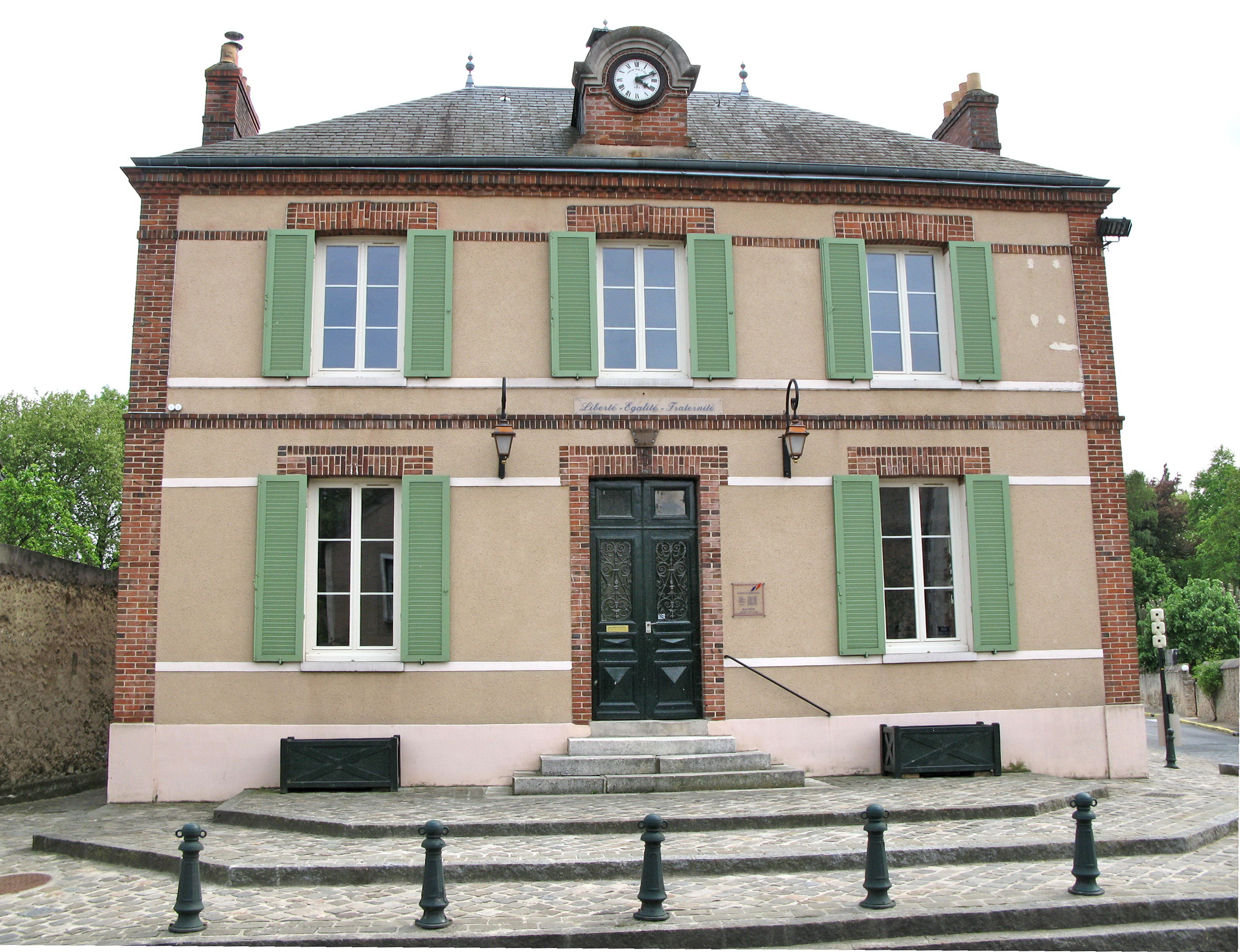 Mairie de la commune de Roinville-sous-Dourdan (Essonne)